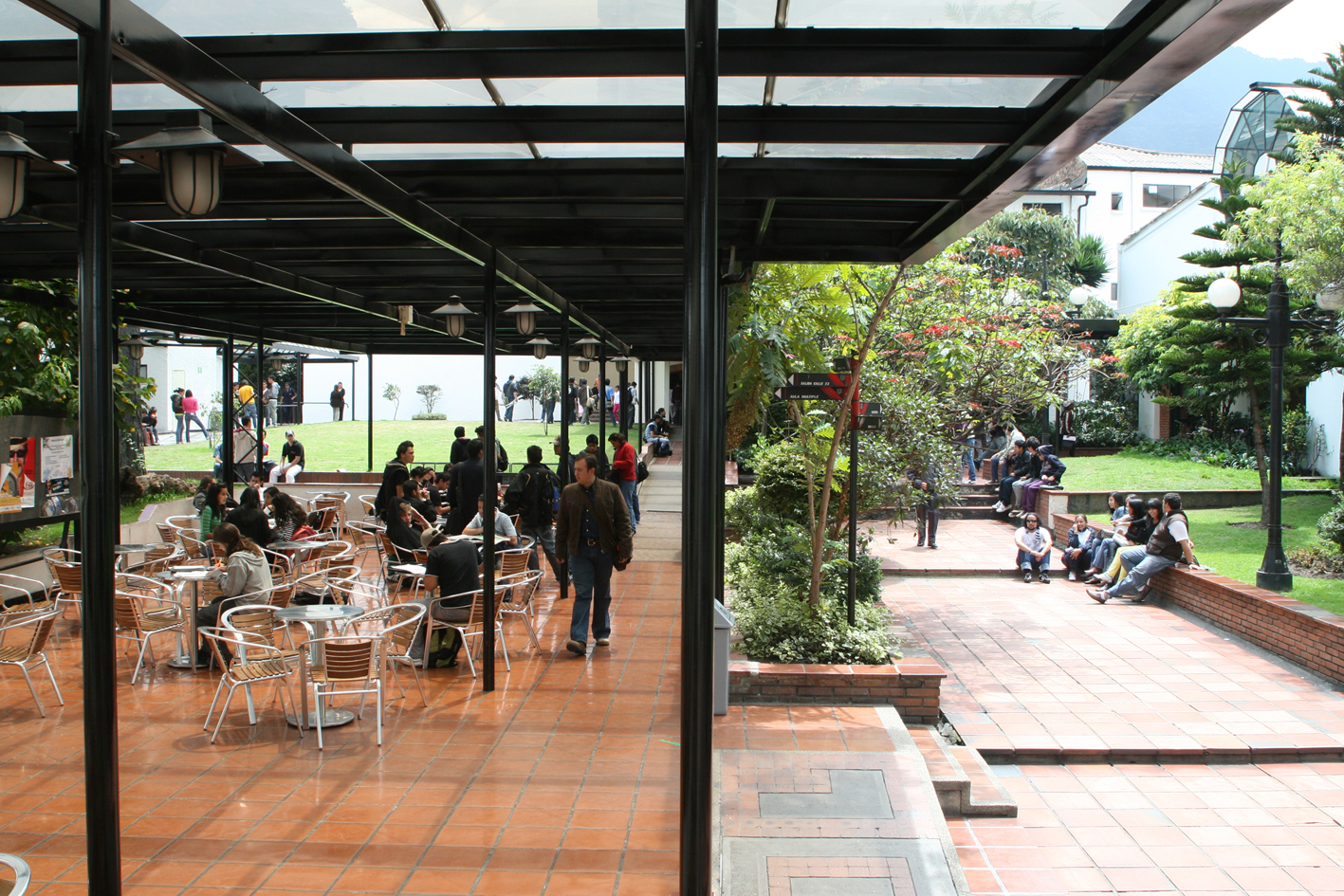 Malecon de la Universidad Central